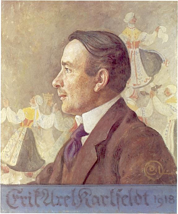 Erik Axel Karlfeldt (1864-1931). Portrait.